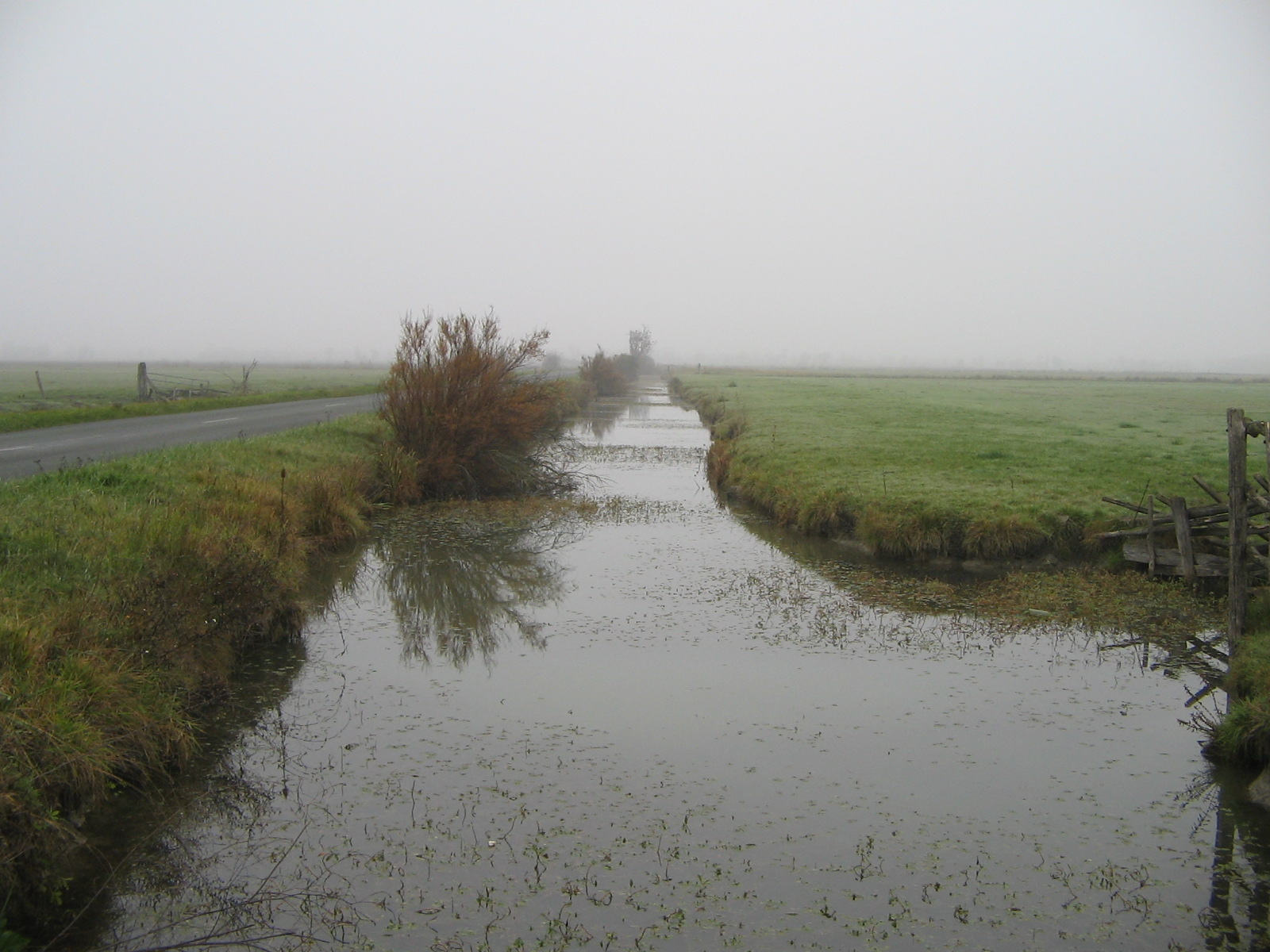 Dans le marais de Genouillé en novembre 2011